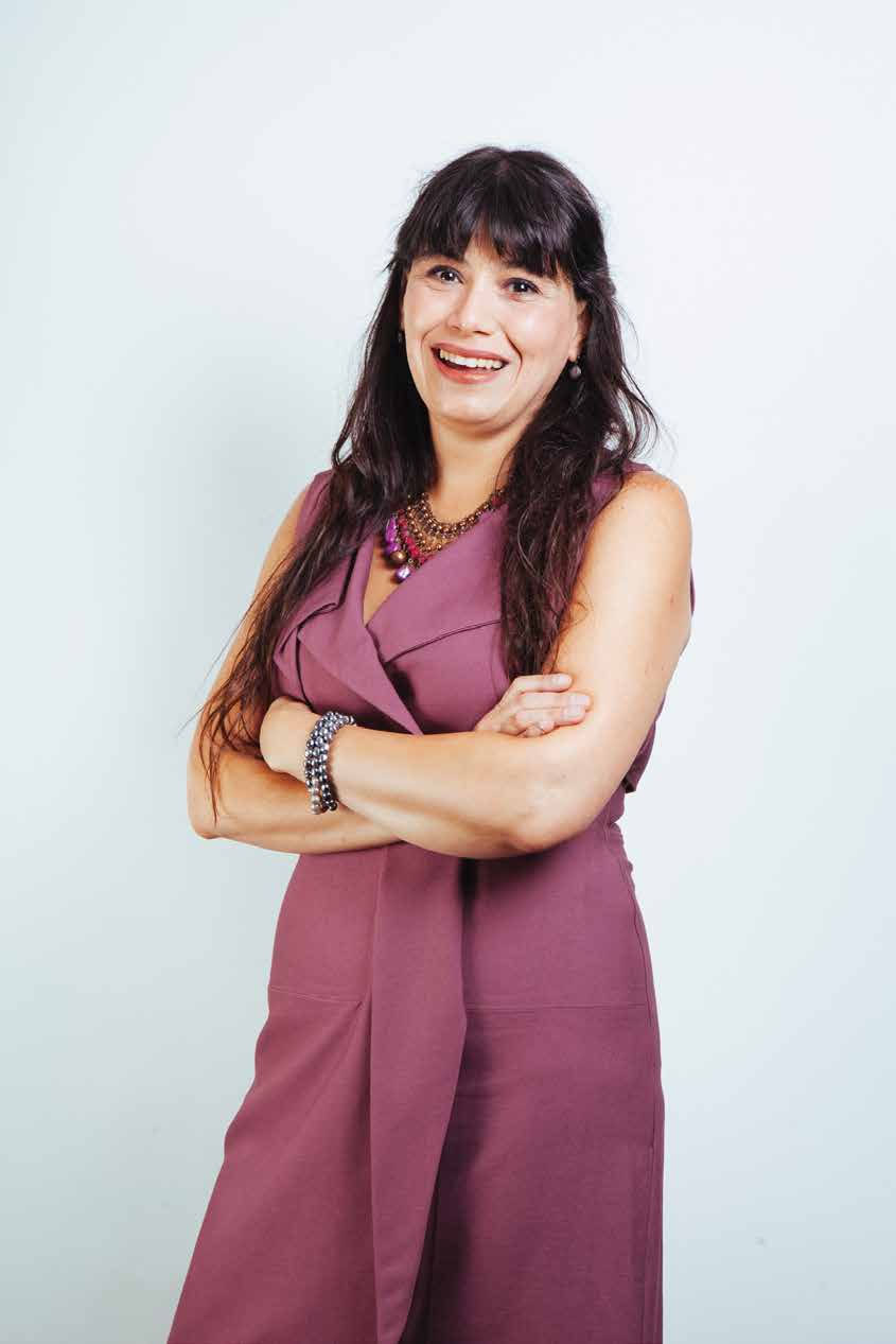 Ministro de Estado del segundo gobierno de Michelle Bachelet (2014-2018)